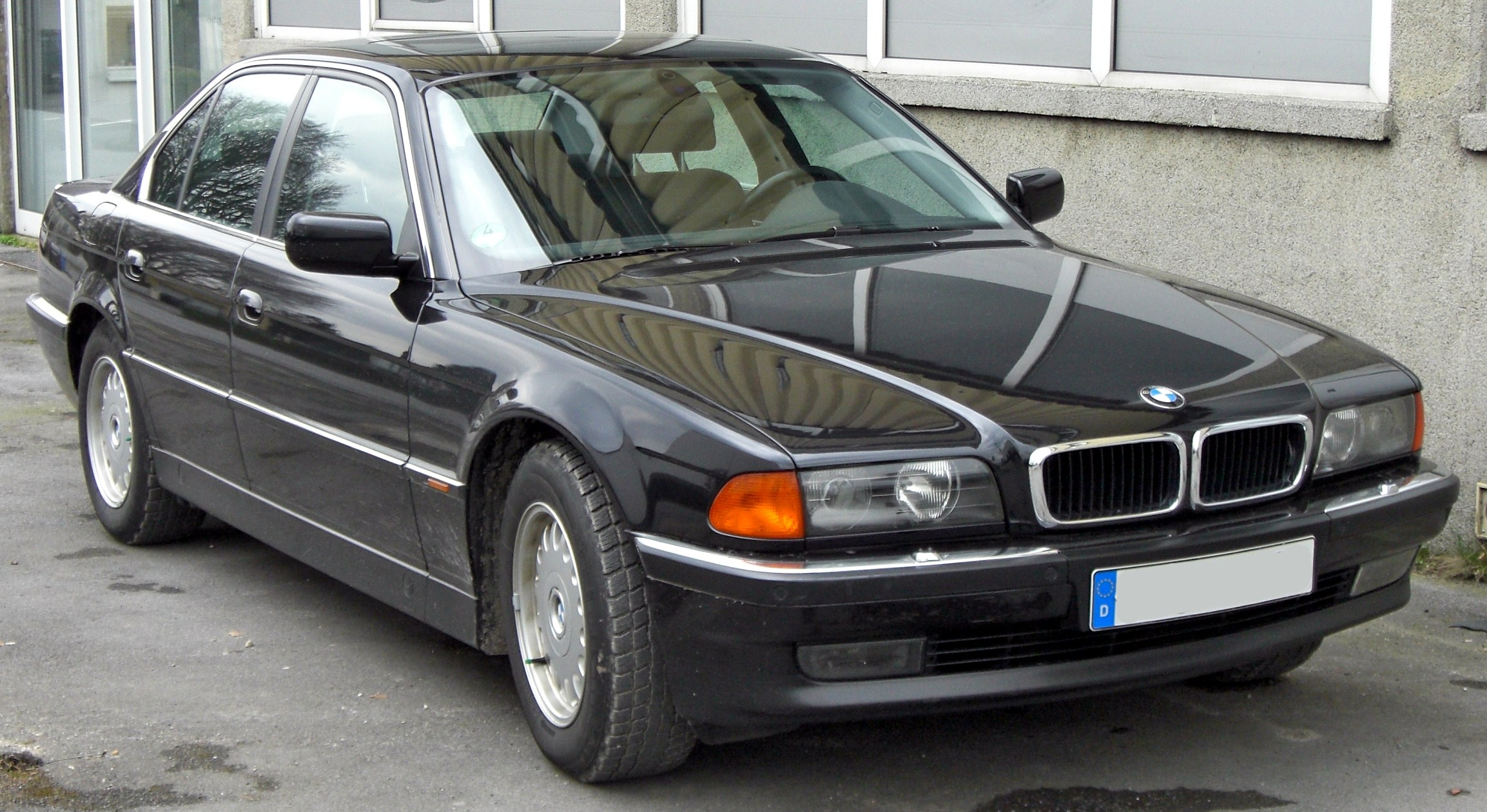 BMW 7er